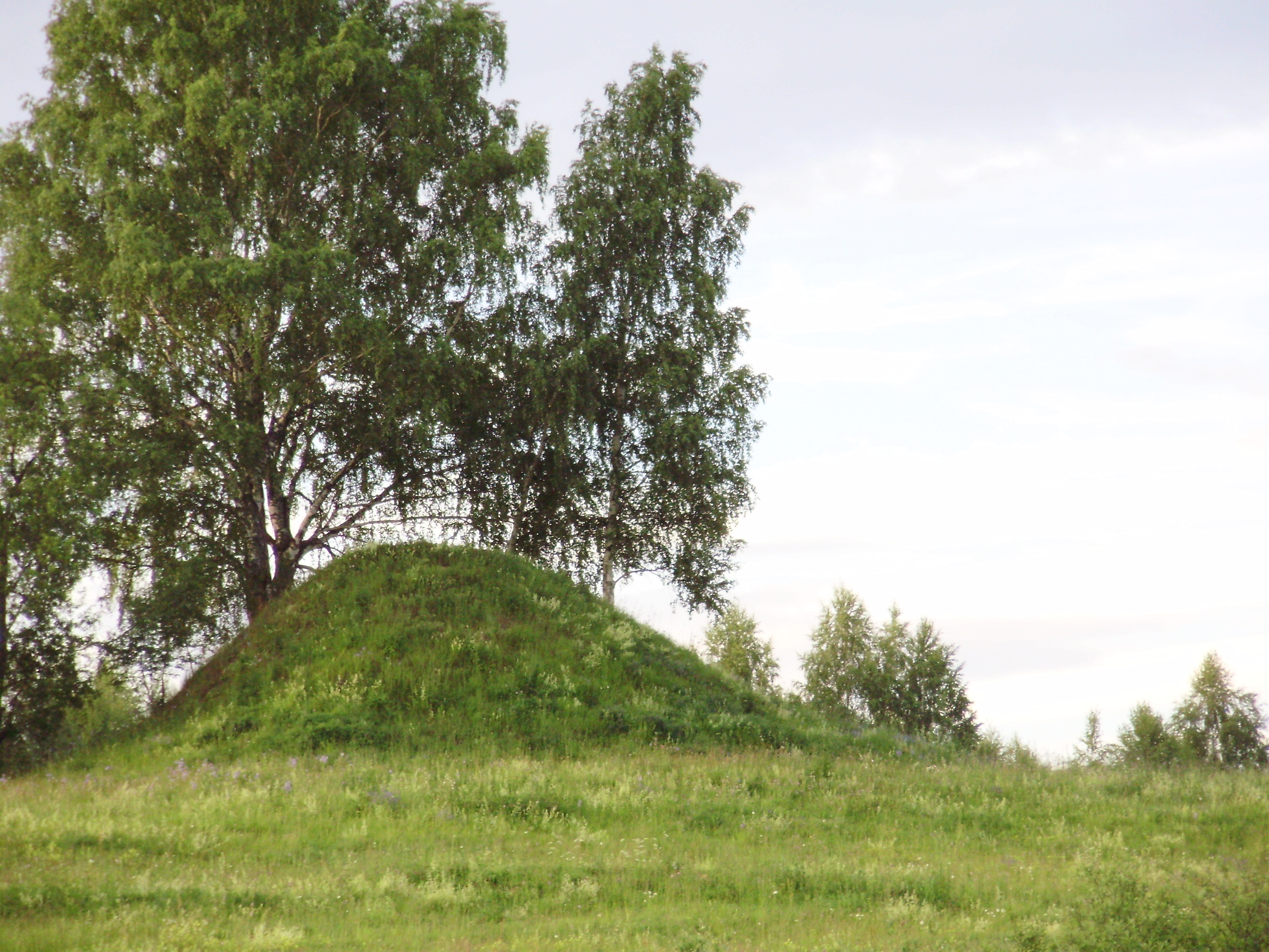 Озеро Большое